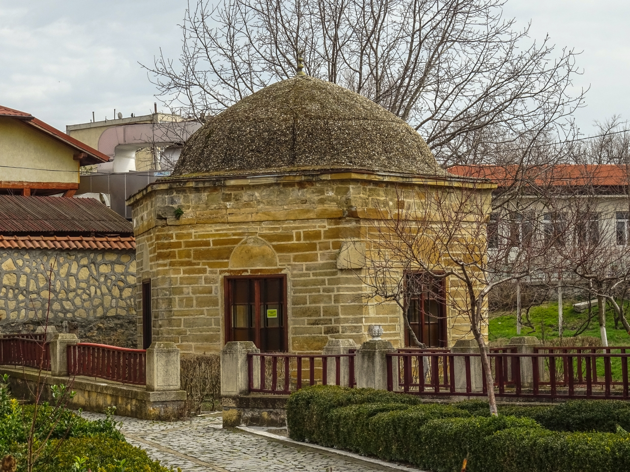 Mormântul lui Ali - Gazi Pașa